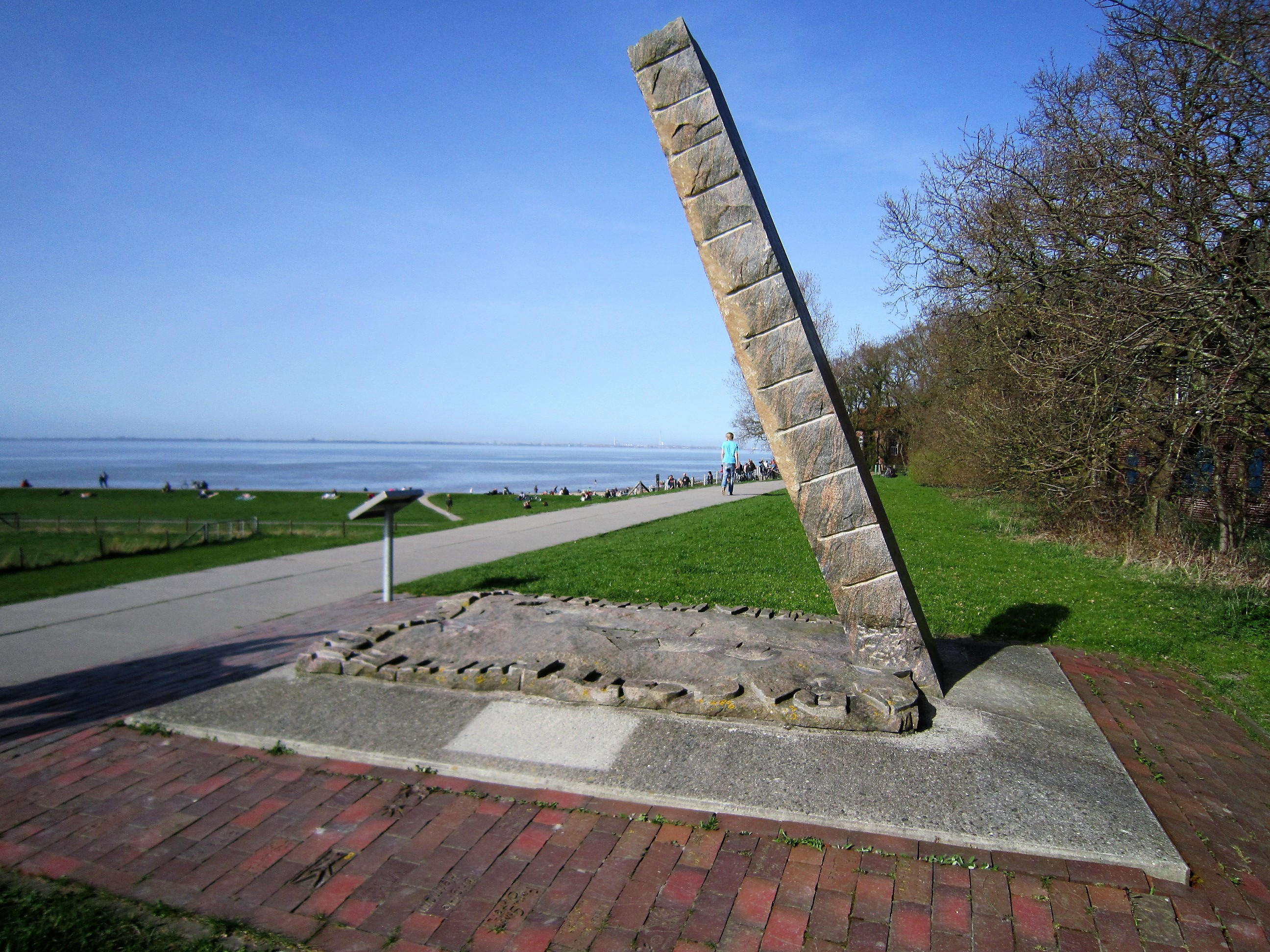 Skulptur "7. Schöpfungstag: „Und Gott segnete den siebten Tag“" von Eckart Grenzer in Dangast (Stadt Varel, Landkreis Friesland in Niedersachsen). Die Skulptur ist Station 7 des "Skulpturenpfads Kunst am Deich" am Radweg zwischen Mariensiel und Dangast, der parallel zum Jadebusen-Deich verläuft.